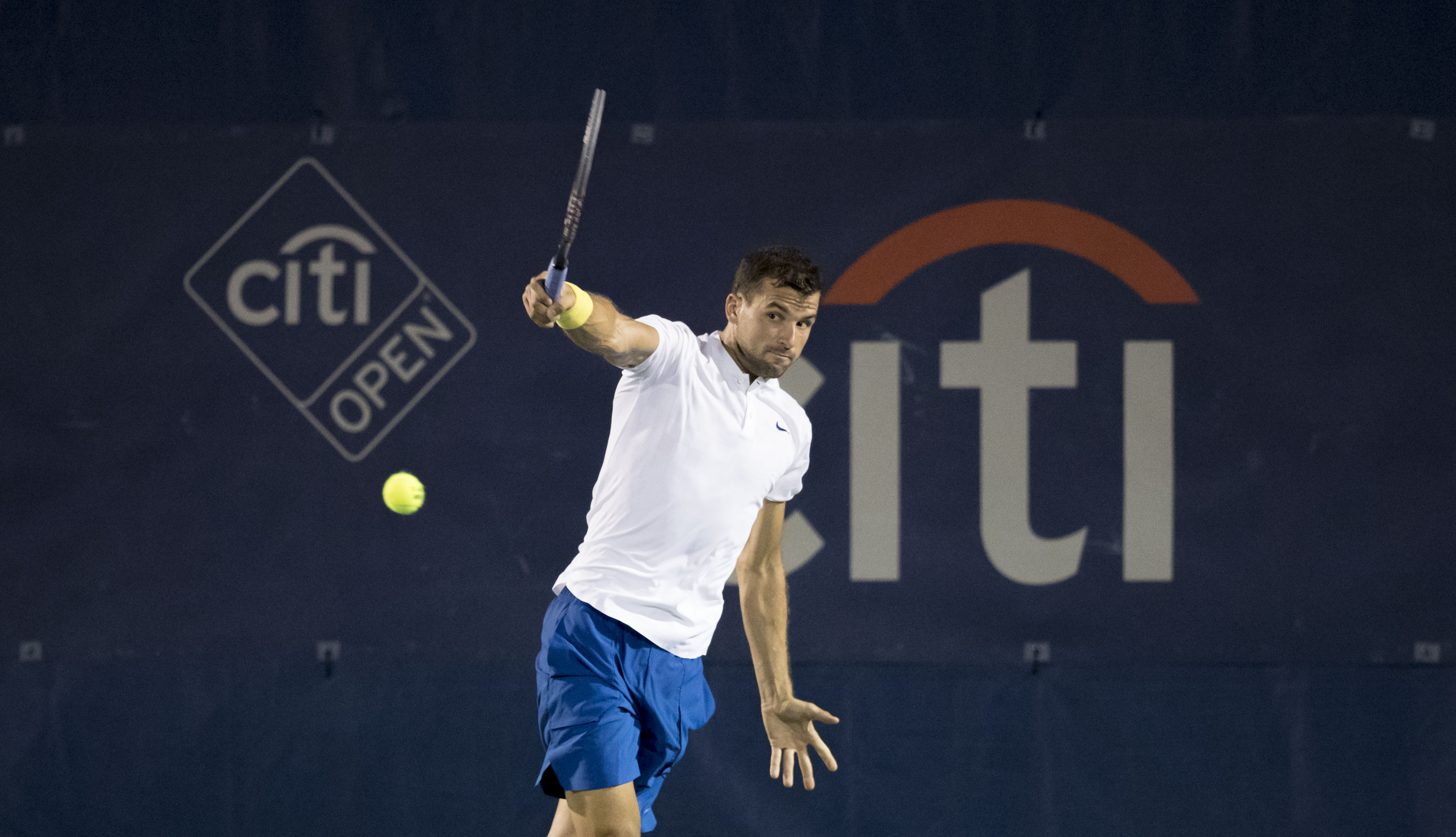 Citi Open Tennis 2017